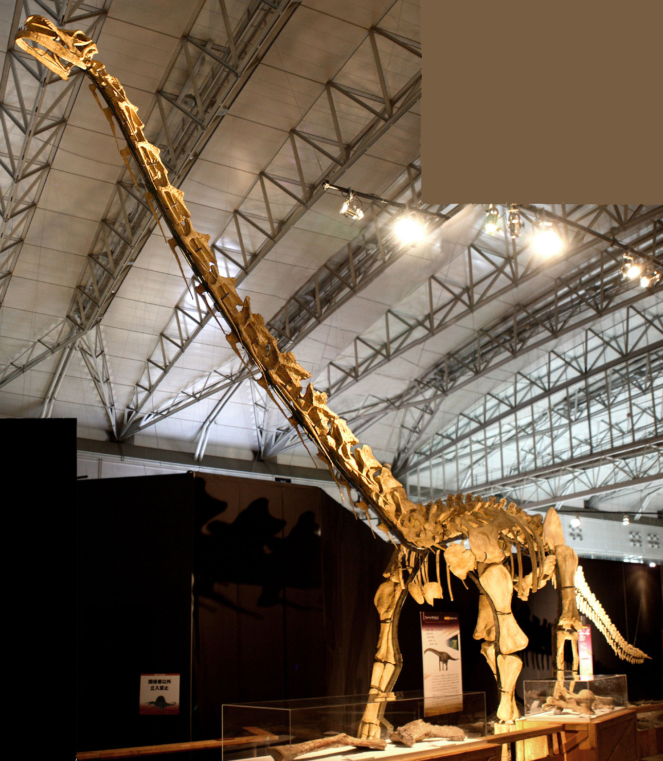 Huabeisaurus - 02